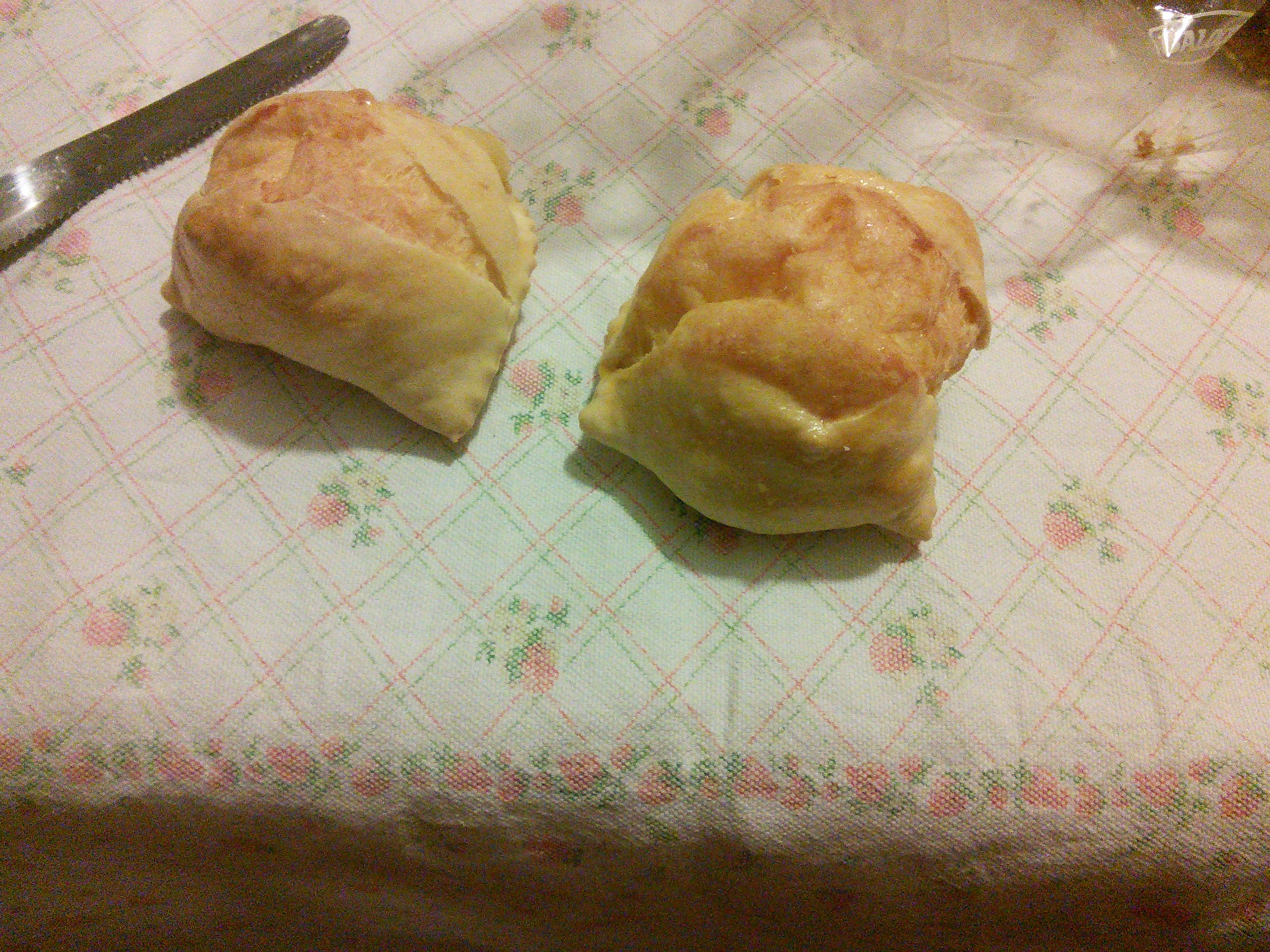 due fiadoni abruzzesi della zona provnciale chietina della majella nel 2017